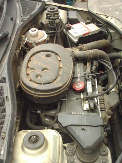 1992 Renault Clio 1.2 Energy engine (E7F), 60 hp